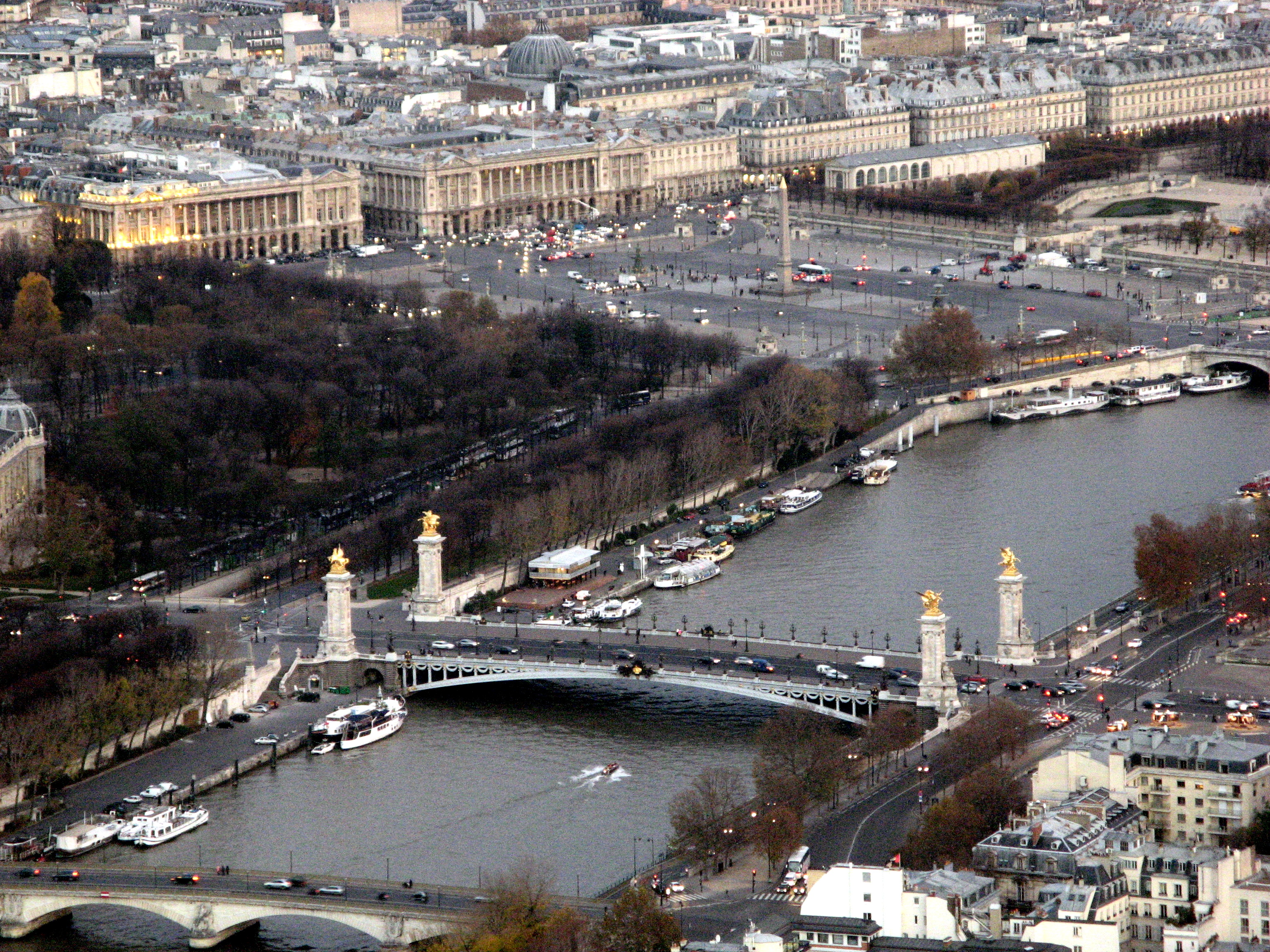 Vue aérienne du Pont Alexandre-III et de la Place de la Concorde, Paris, France.